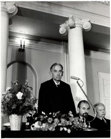 Keeleteadlane Arnold Kask 70. sünnipäeval (1972)